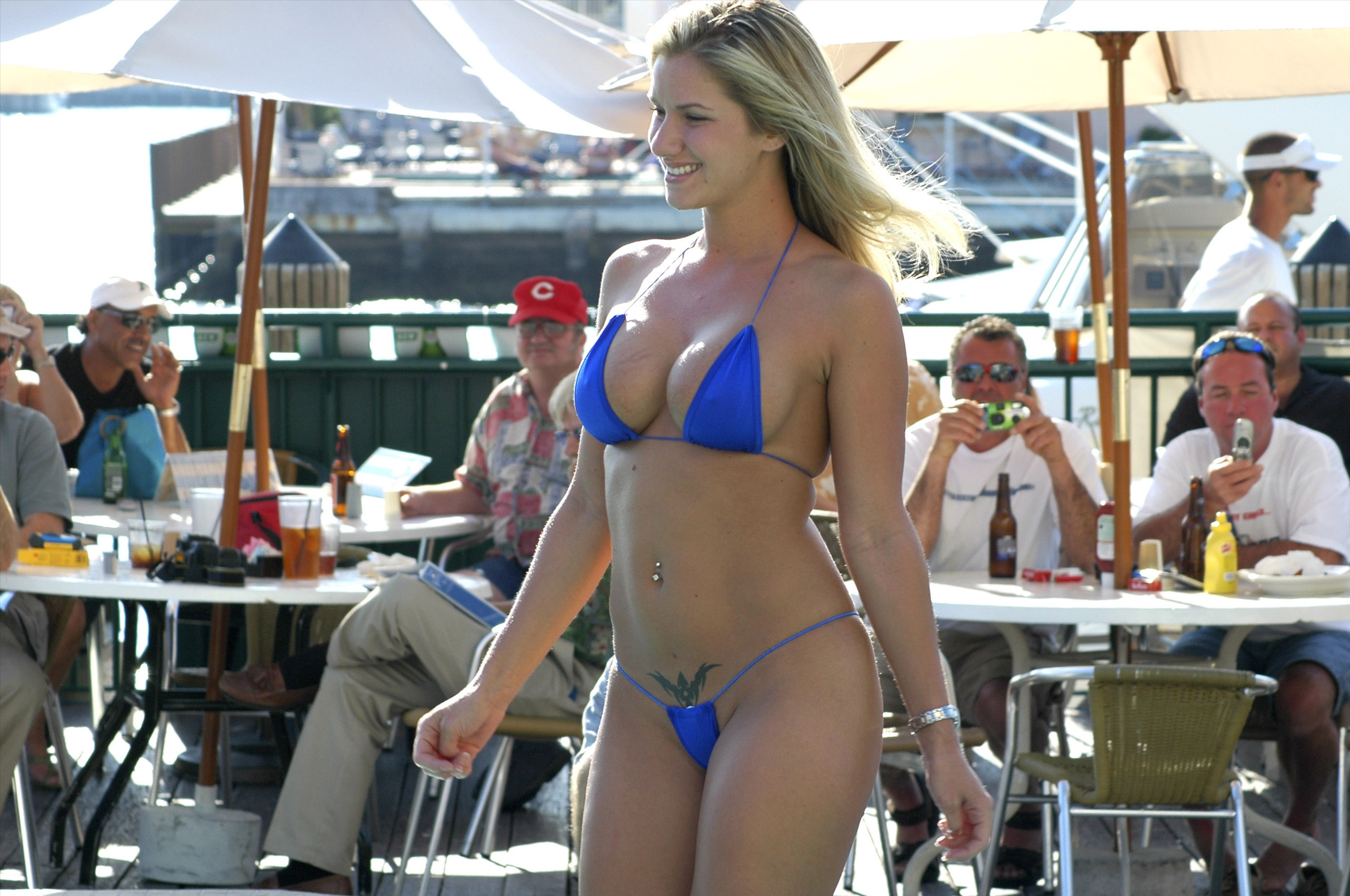 Bikini contest in Florida